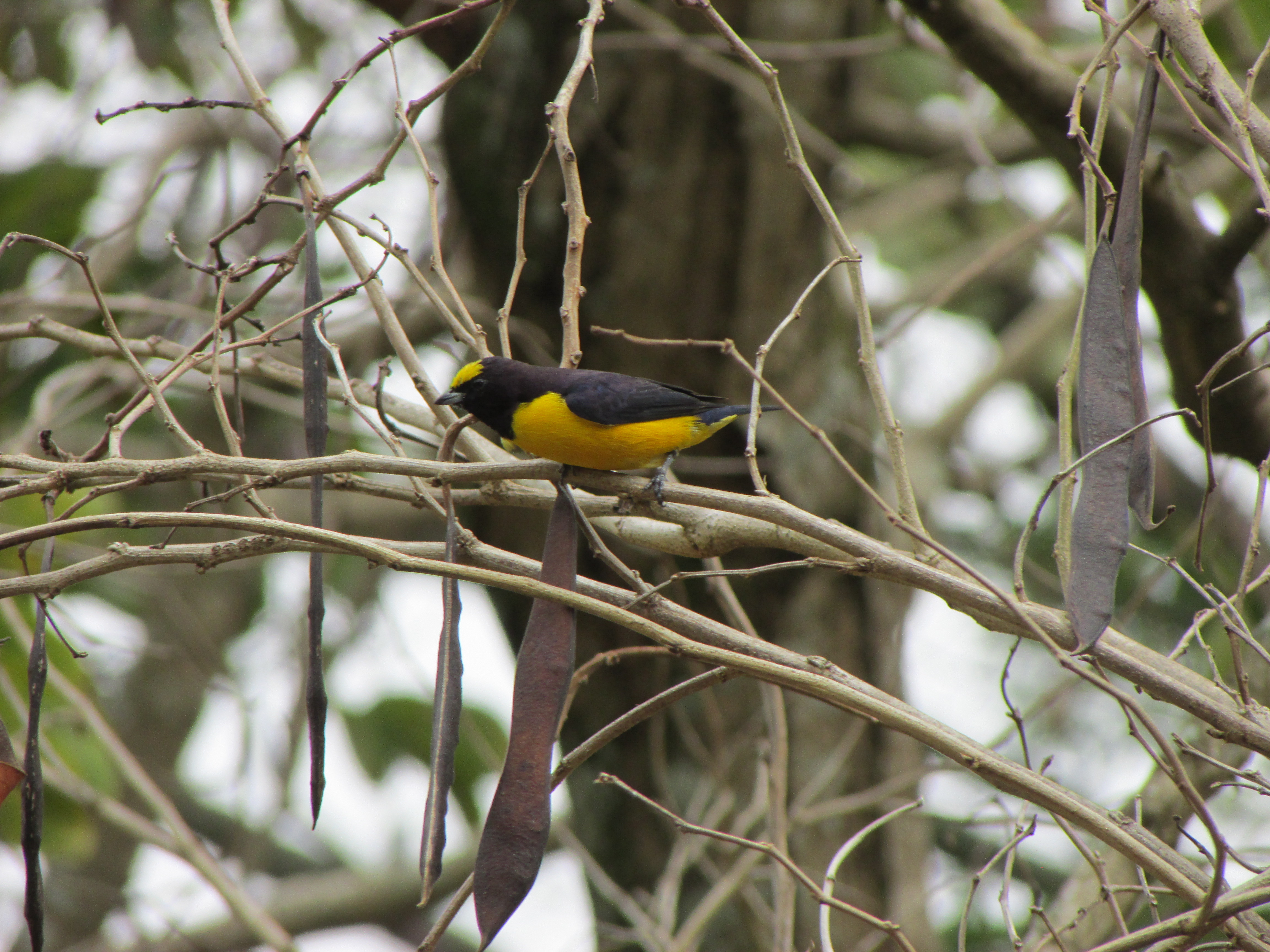 Foto tirada em Capão Bonito-SP